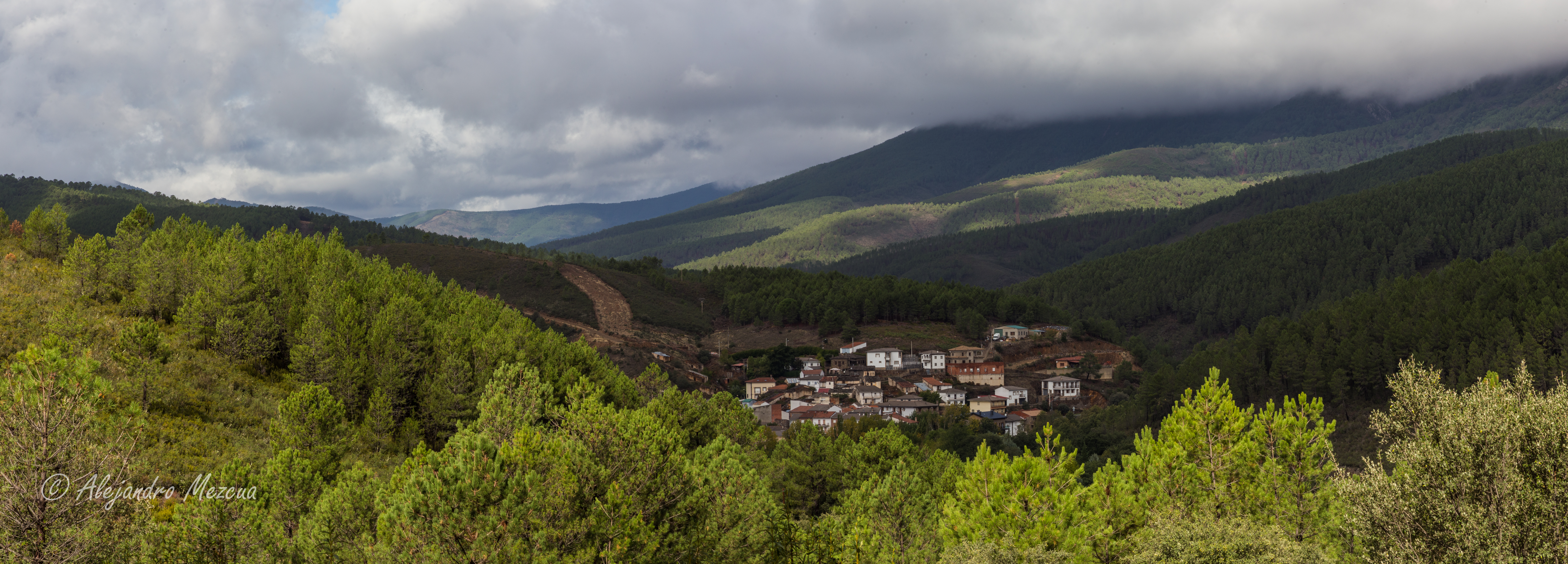 Las Hurdes This is a photography of a Special Area of Conservation in Spain with the ID: ES4320011. Natura2000 entry, EEA entry